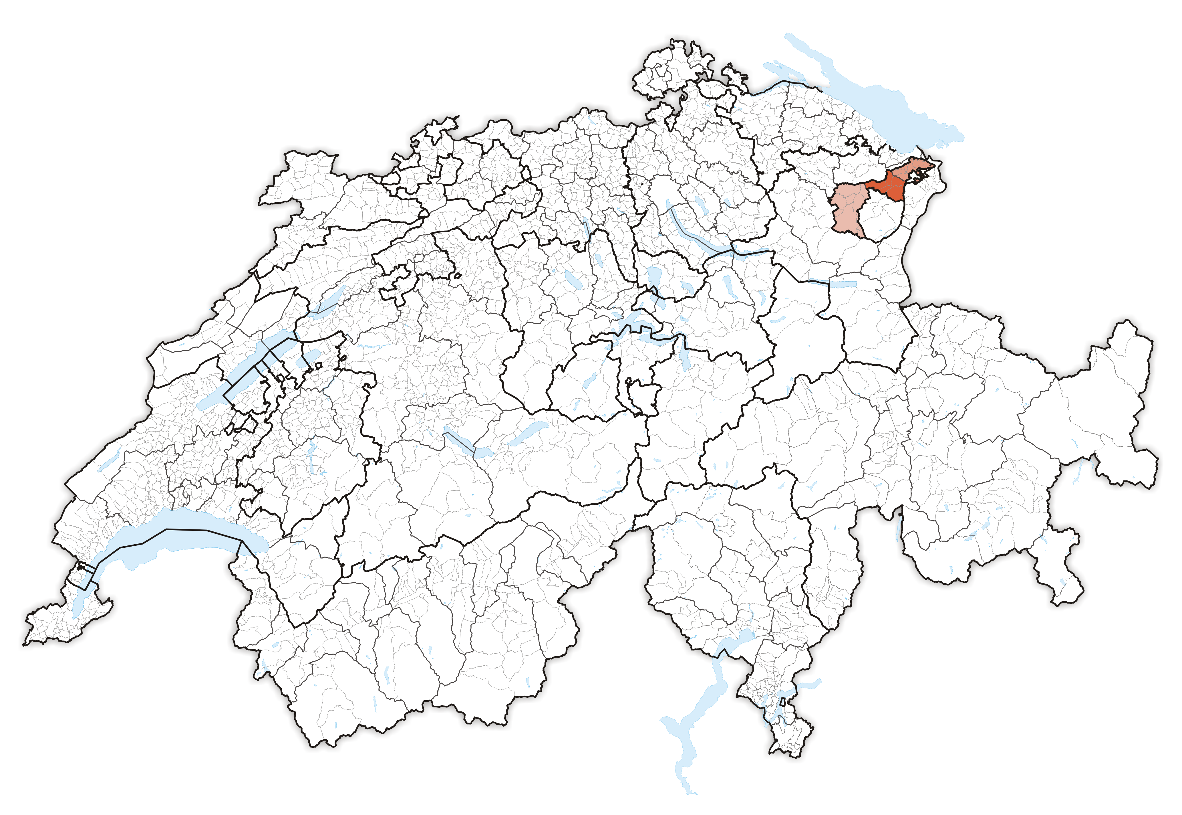 Canton Appenzell Ausserrhoden